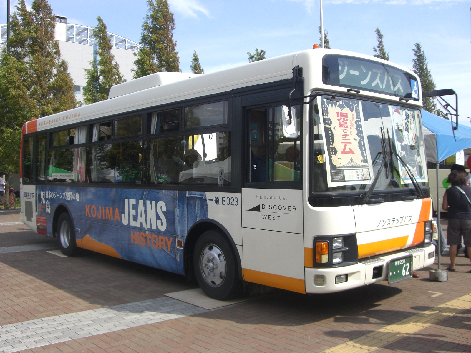 下津井電鉄ジーンズバス 第10回スルッとKANSAIバスまつり展示